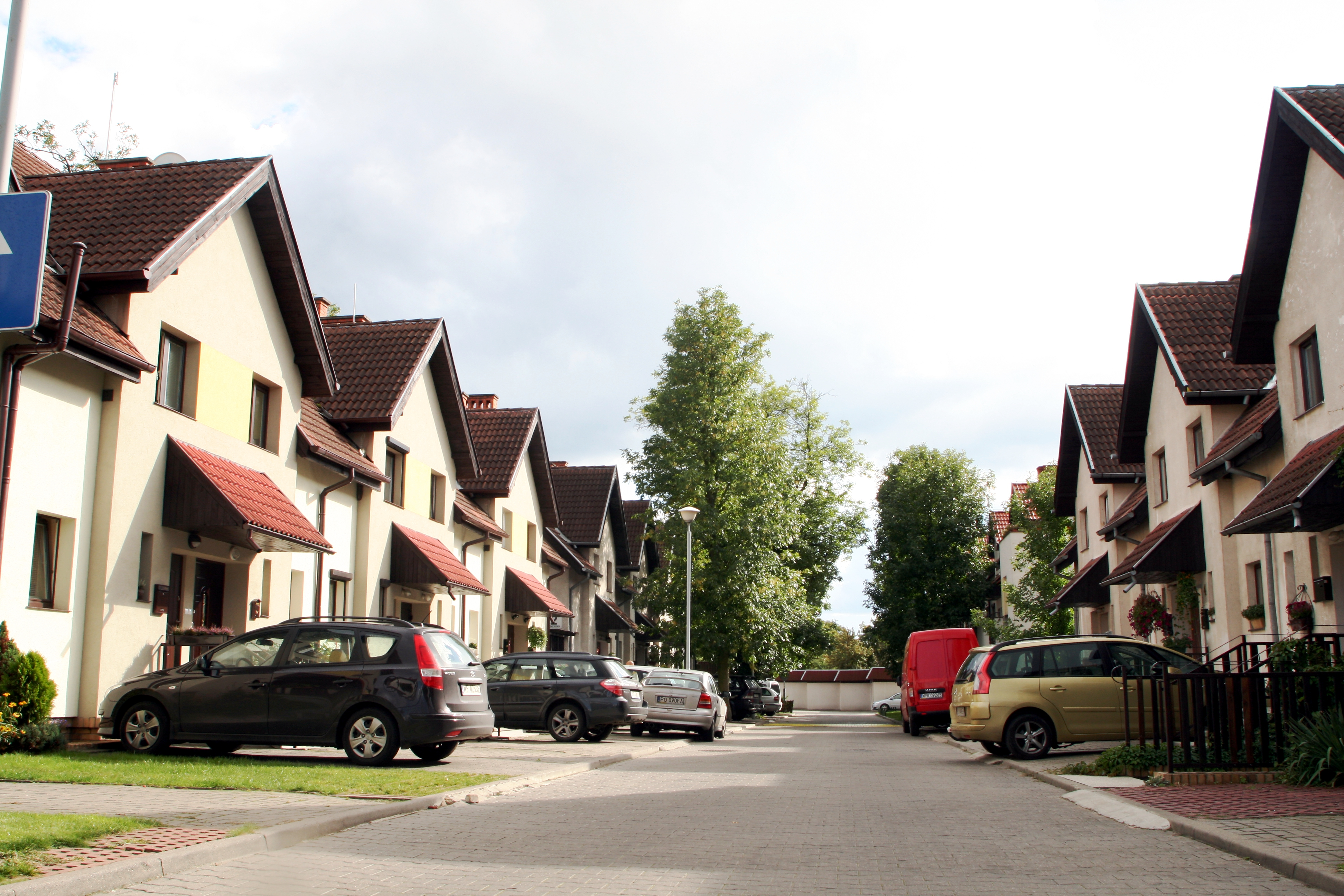 Zabudowa szeregowa z lat 90. XX wieku na Świerczewie